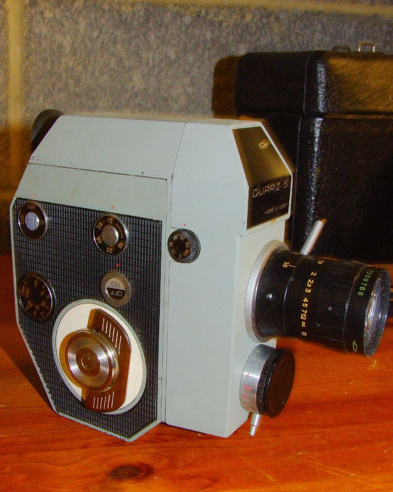 Kamera Zenit QUARZ-5